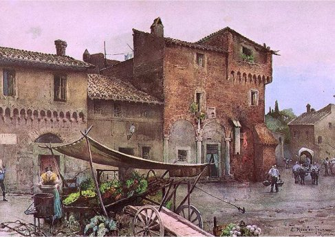 Case Medioevali a Santa Cecilia in Rome (rione Trastevere)